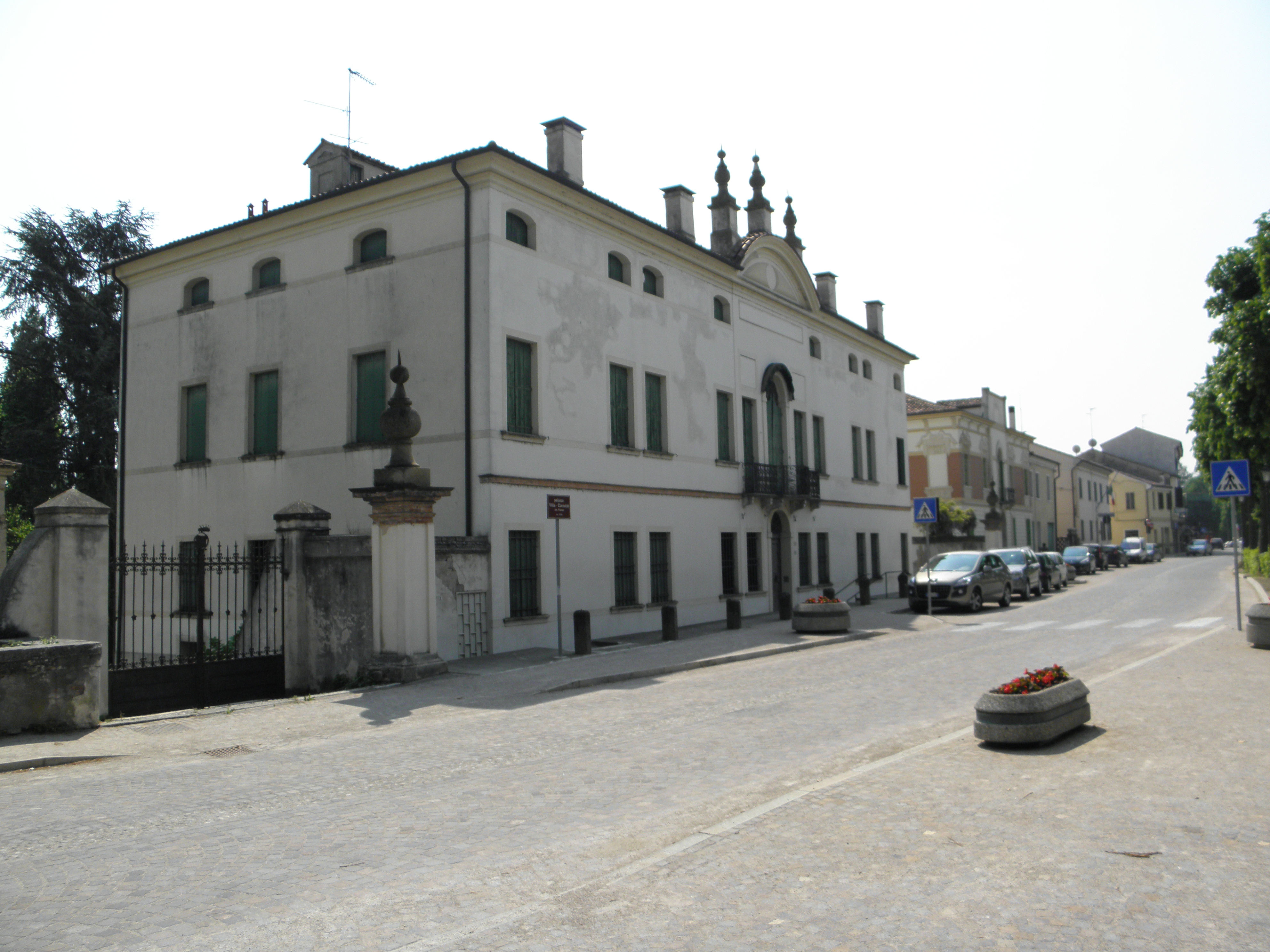 Fratta Polesine: Villa Cornoldi.